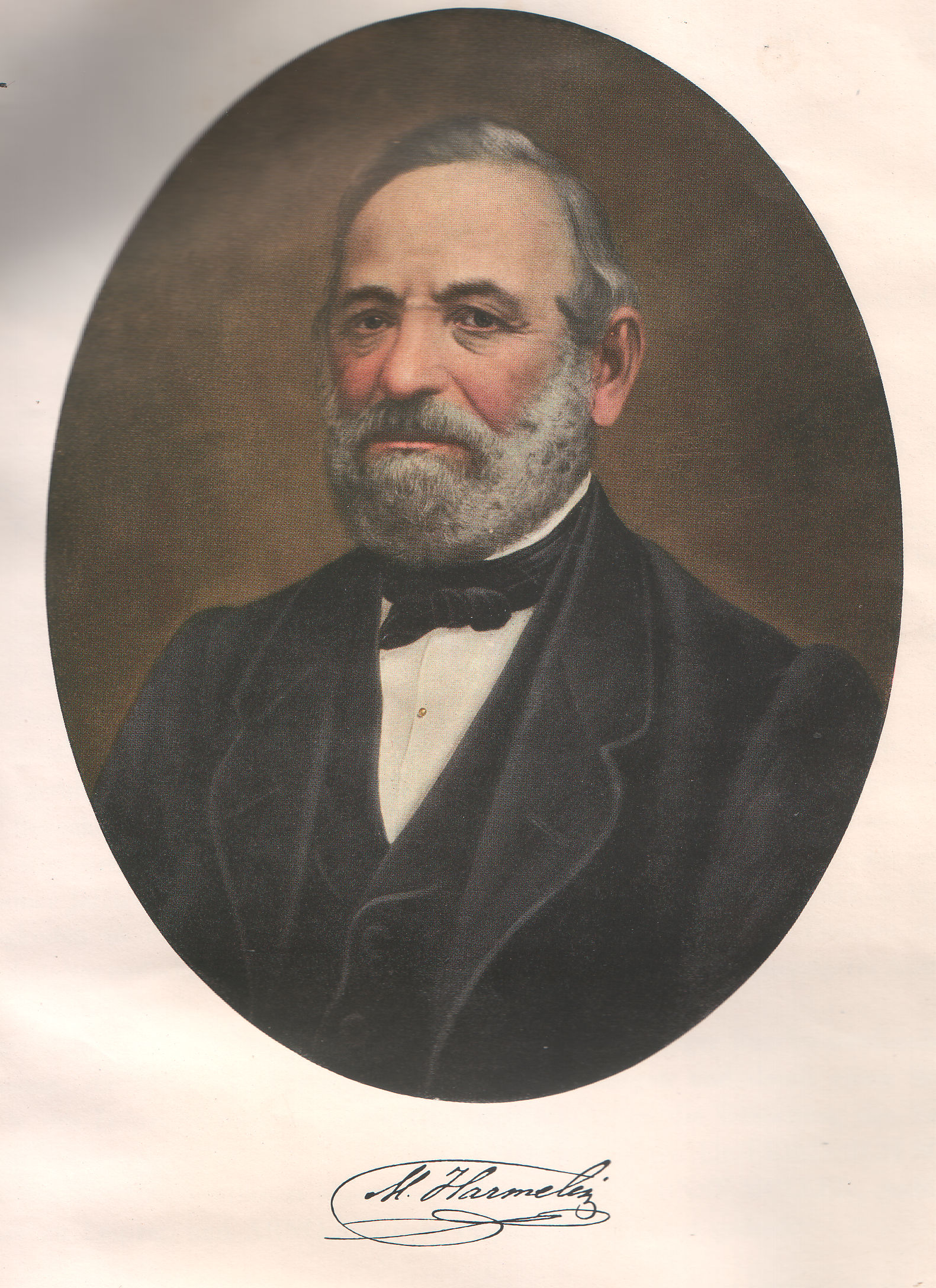 Aus: Hundert Jahre Marcus Harmelin 1830-1930. Rauchwaren und Borstenkommission. Firmenschrift zum hundertjährigen Bestehen.